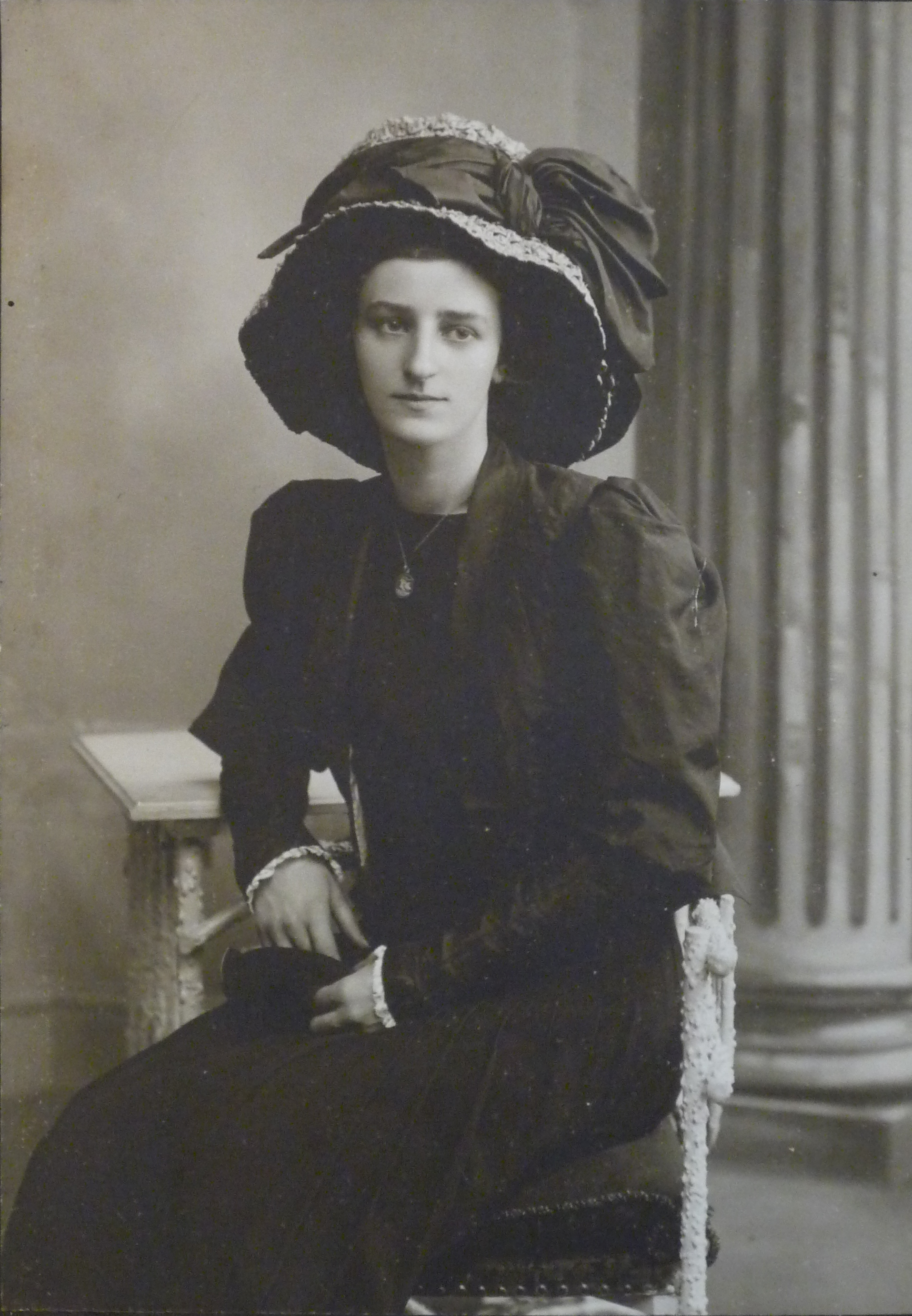 Kasia von Szadurska, Foto in einer Ausstellung im Neuen Schloss zu Meersburg